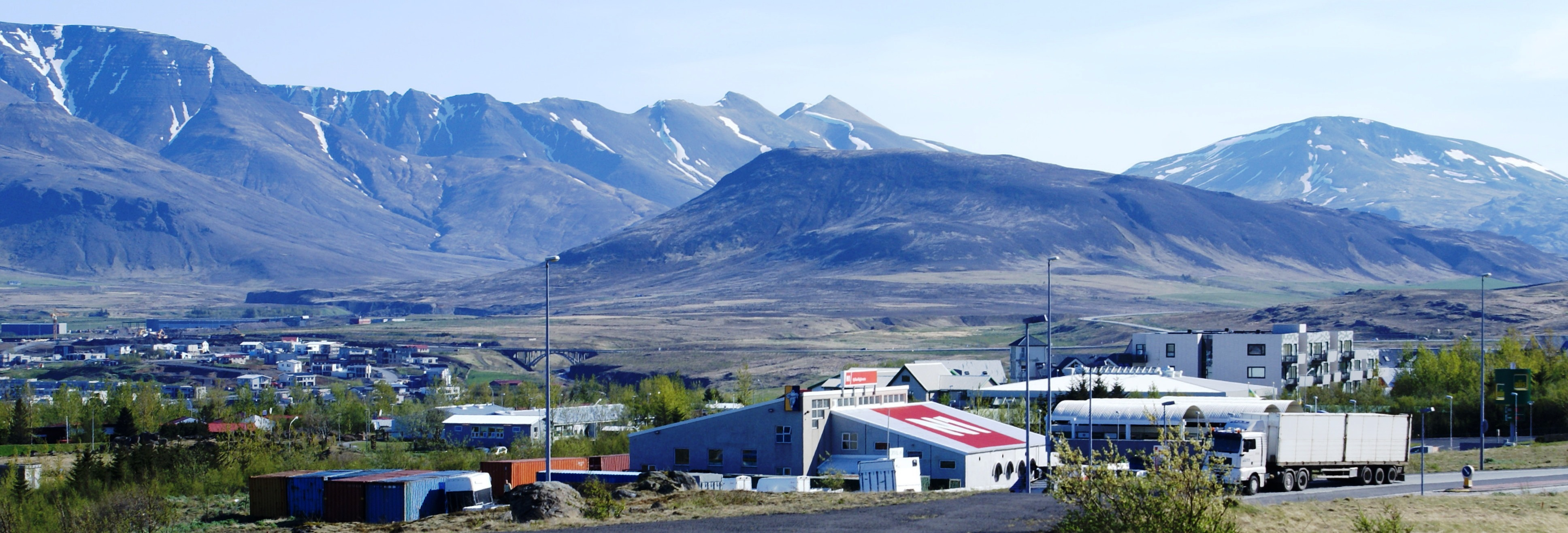 Mosfellsbær (einnig kallað Mosó) er sveitarfélag sem liggur norðaustan við Reykjavík.